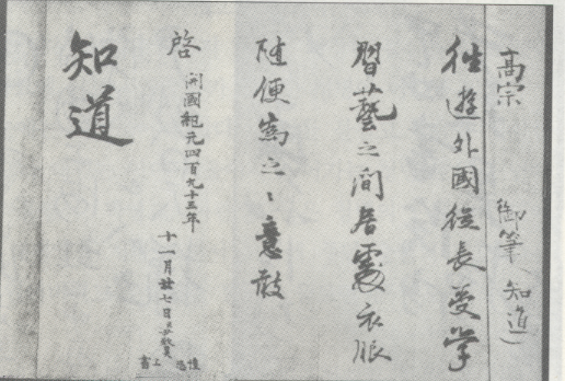 윤치호의 출국 상소문